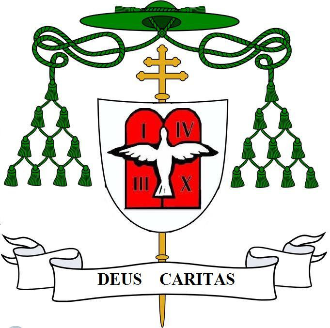 Herb abp Tokarczuka